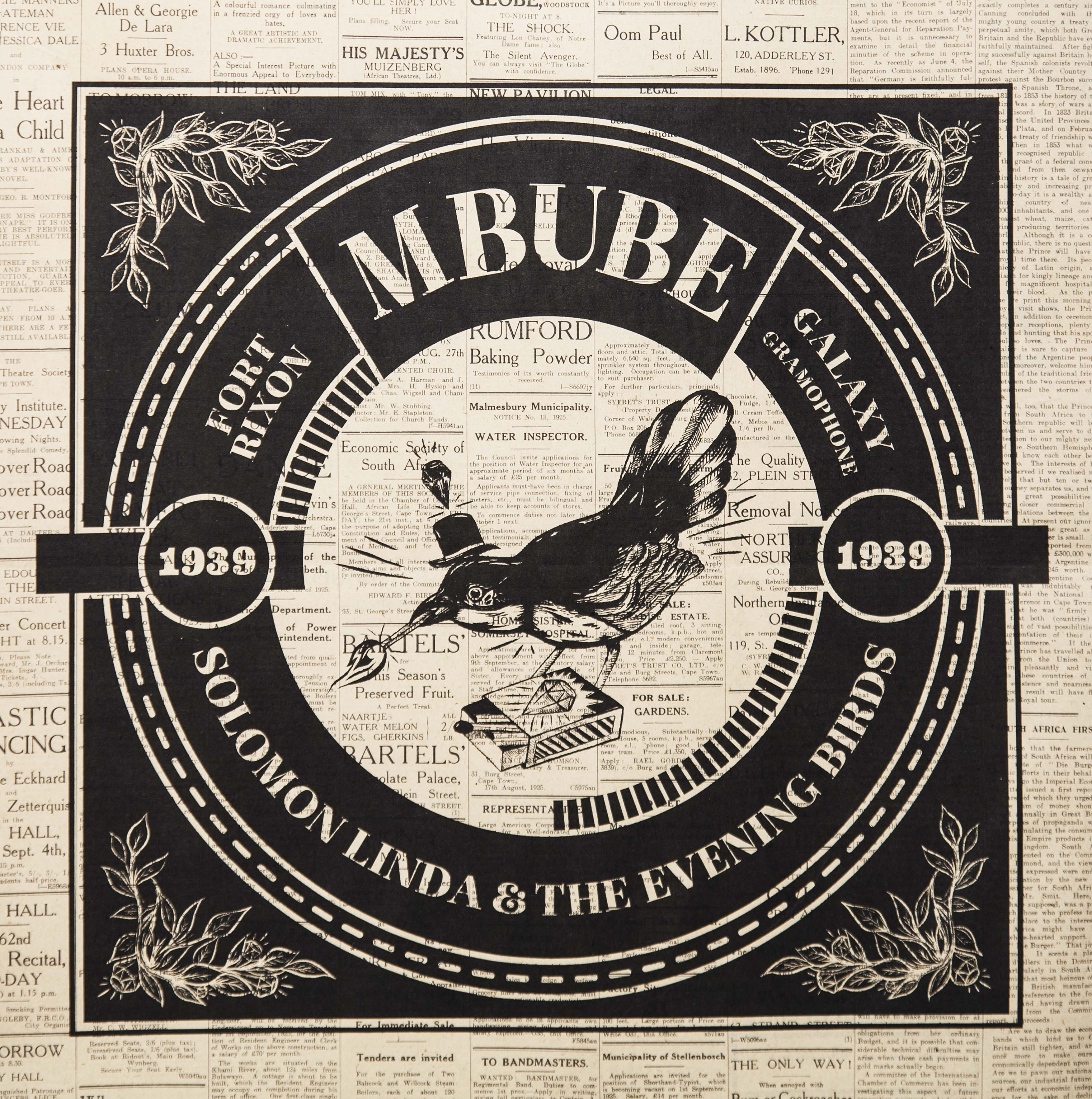 Plakát na vystoupení S. Lindy s The Evening Birds